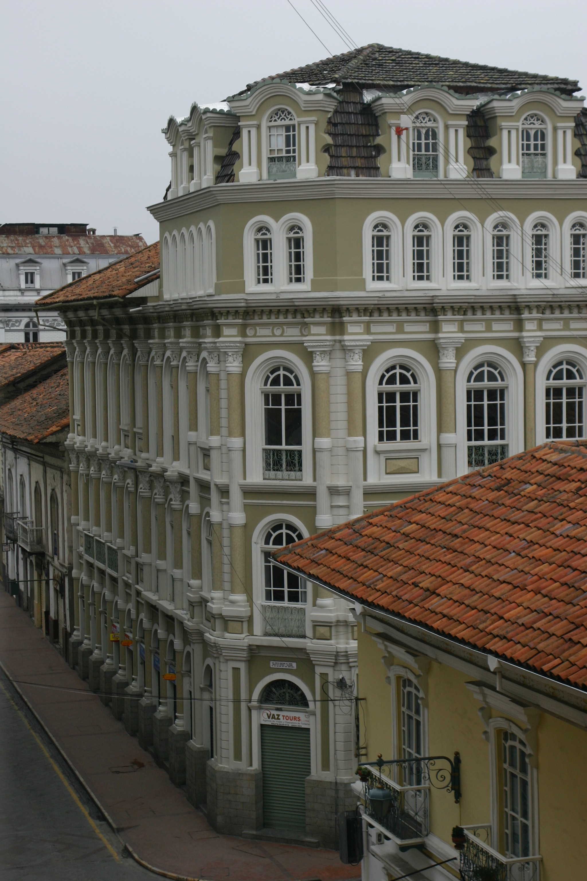 Photographer: Alfredo Molina Date: 01.05.2005 Description: Cuenca, Ecuador (corner of streets Gran Colombia and Luis Cordero) Beschreibung: Cuenca, Ecuador (Ecke der Straßen Gran Colombia und Luis Cordero)